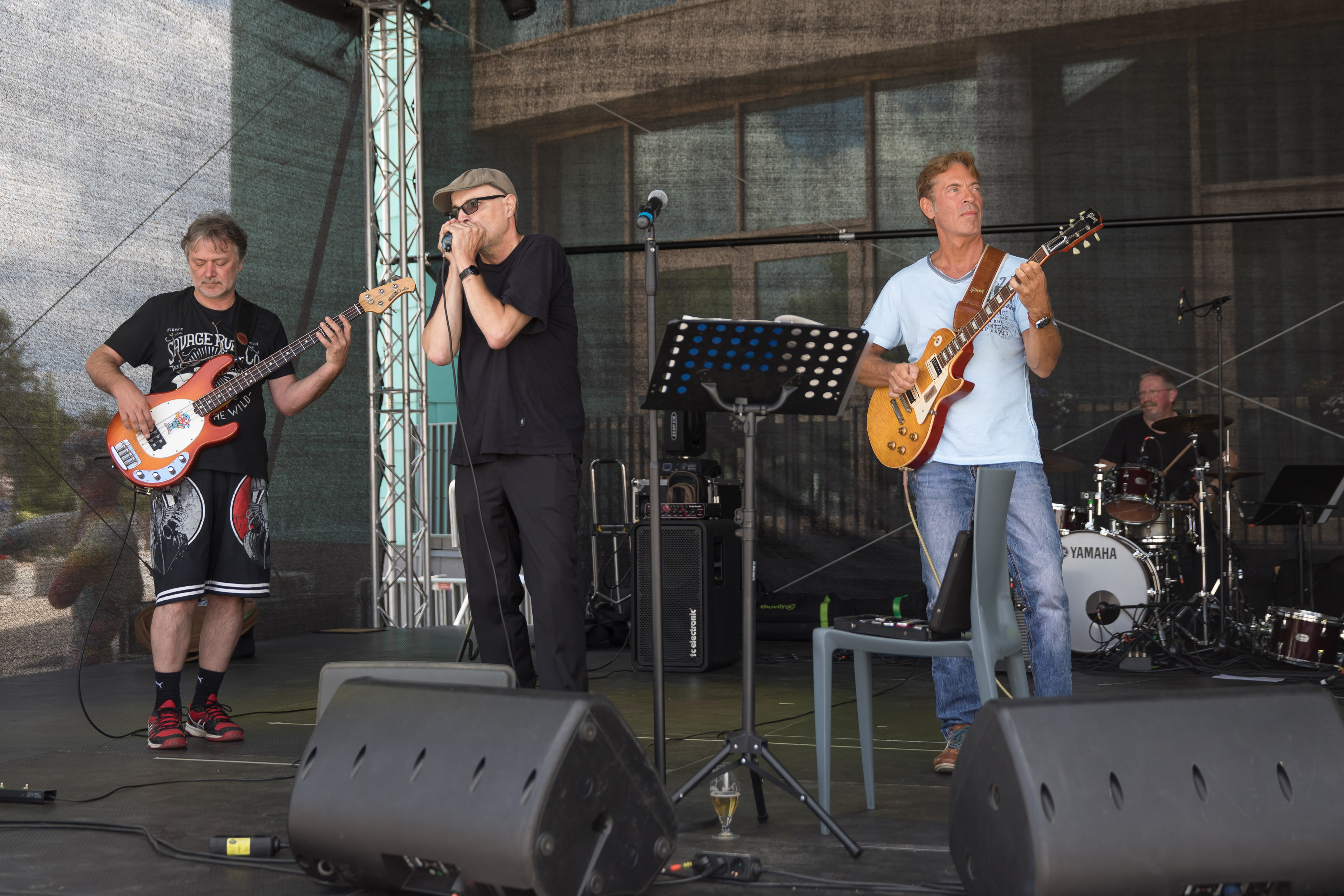 Greyhounds59 op der Fête de la Musique zu Bartreng